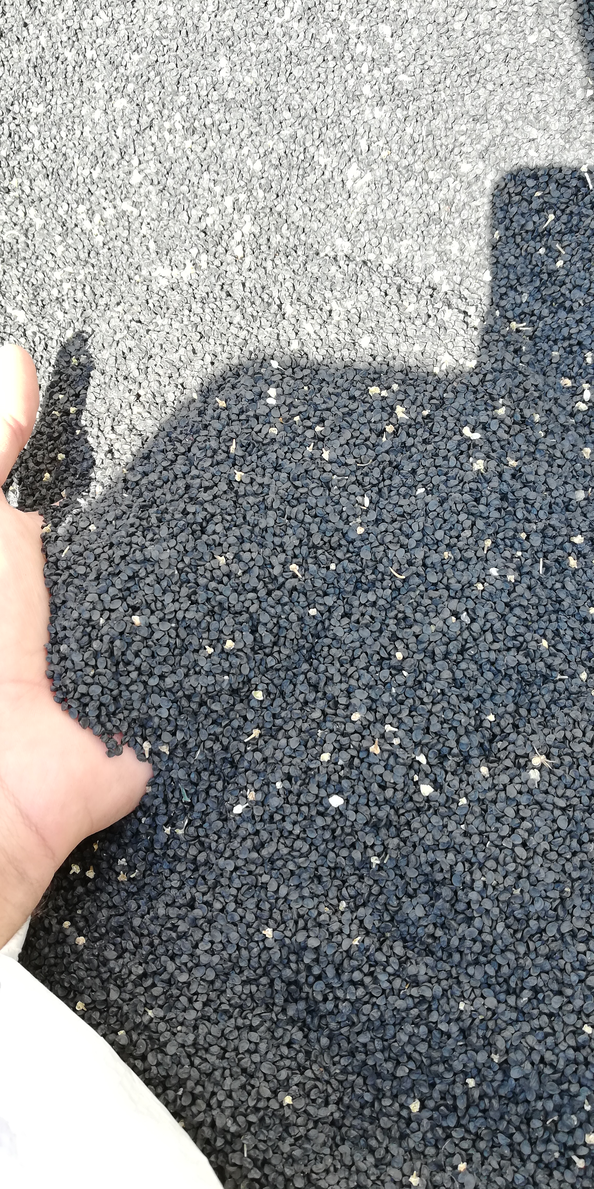 seme di cipolla